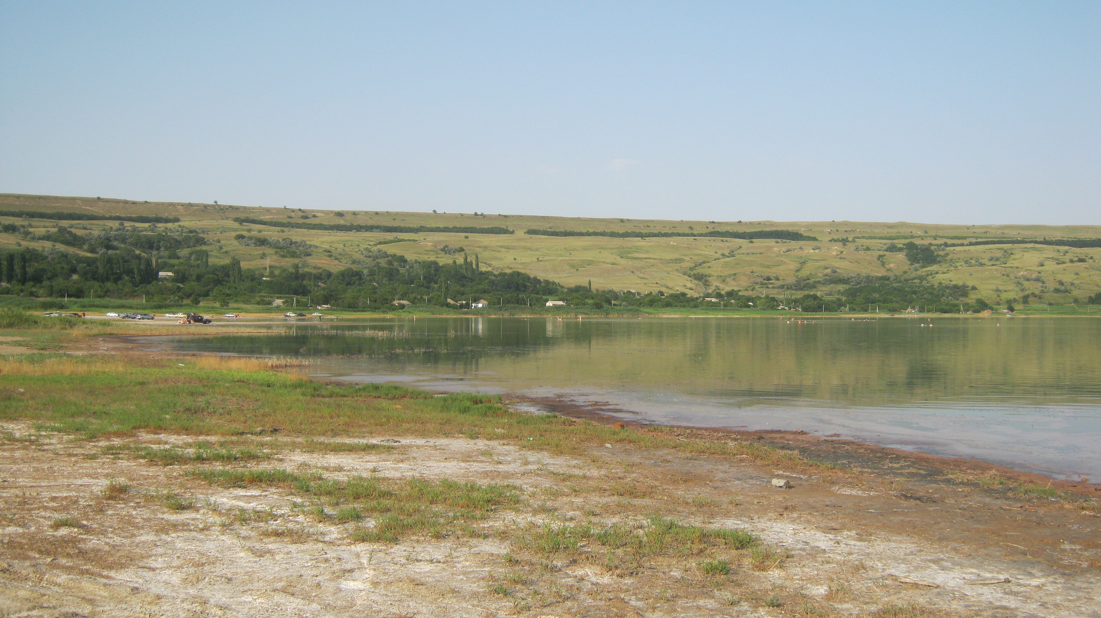 Озеро Лущниковское и хутор Солёное озеро